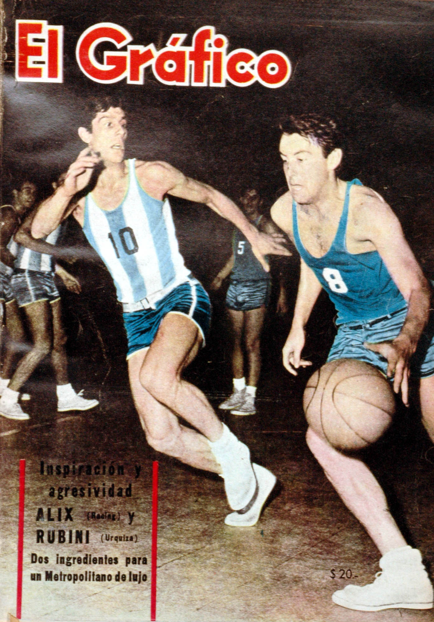 El Grafico del 08 de Enero de 1964. Edicion 2309